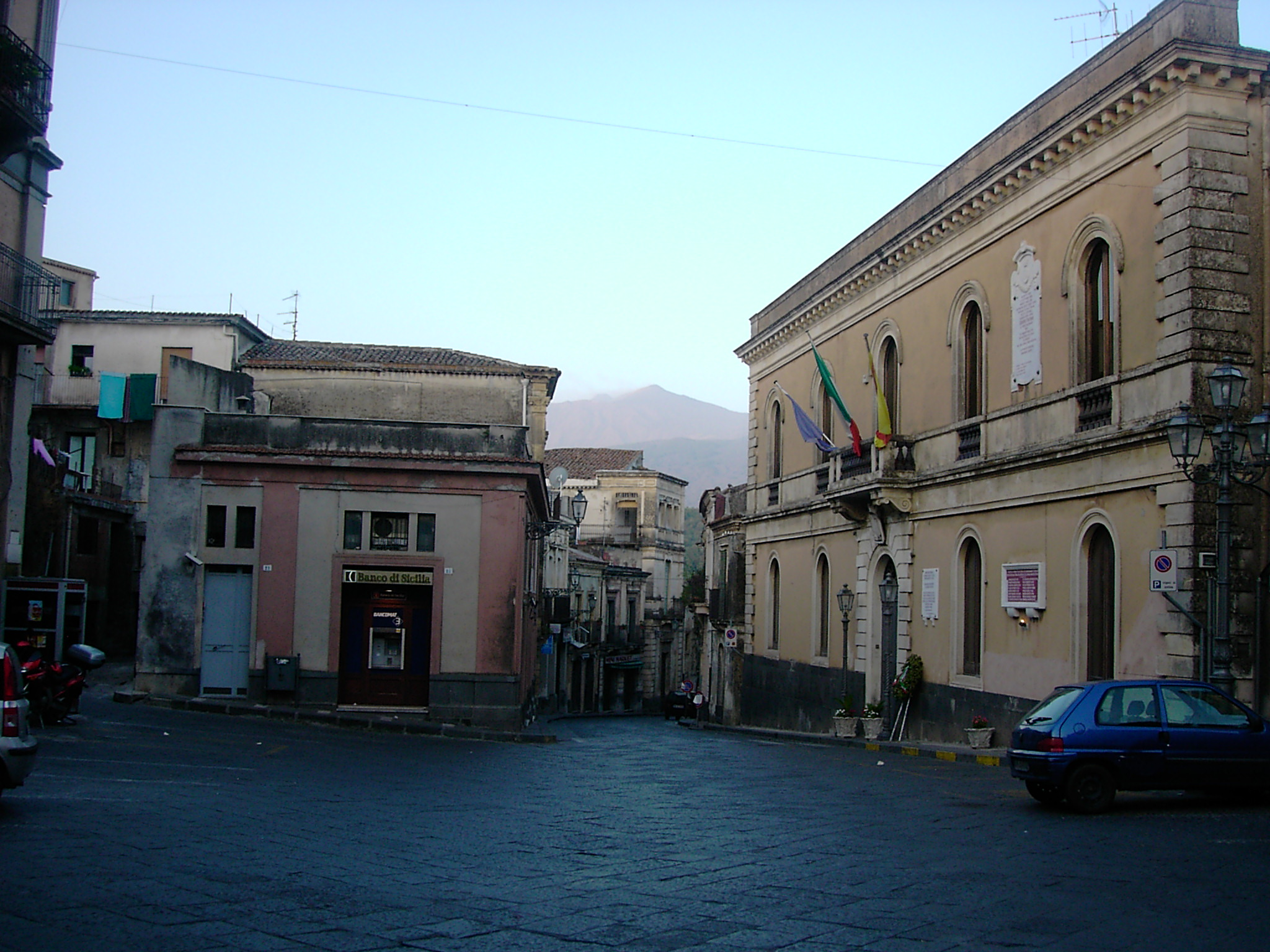 Castiglione di Sicilia: veduta di Piazza Lauria